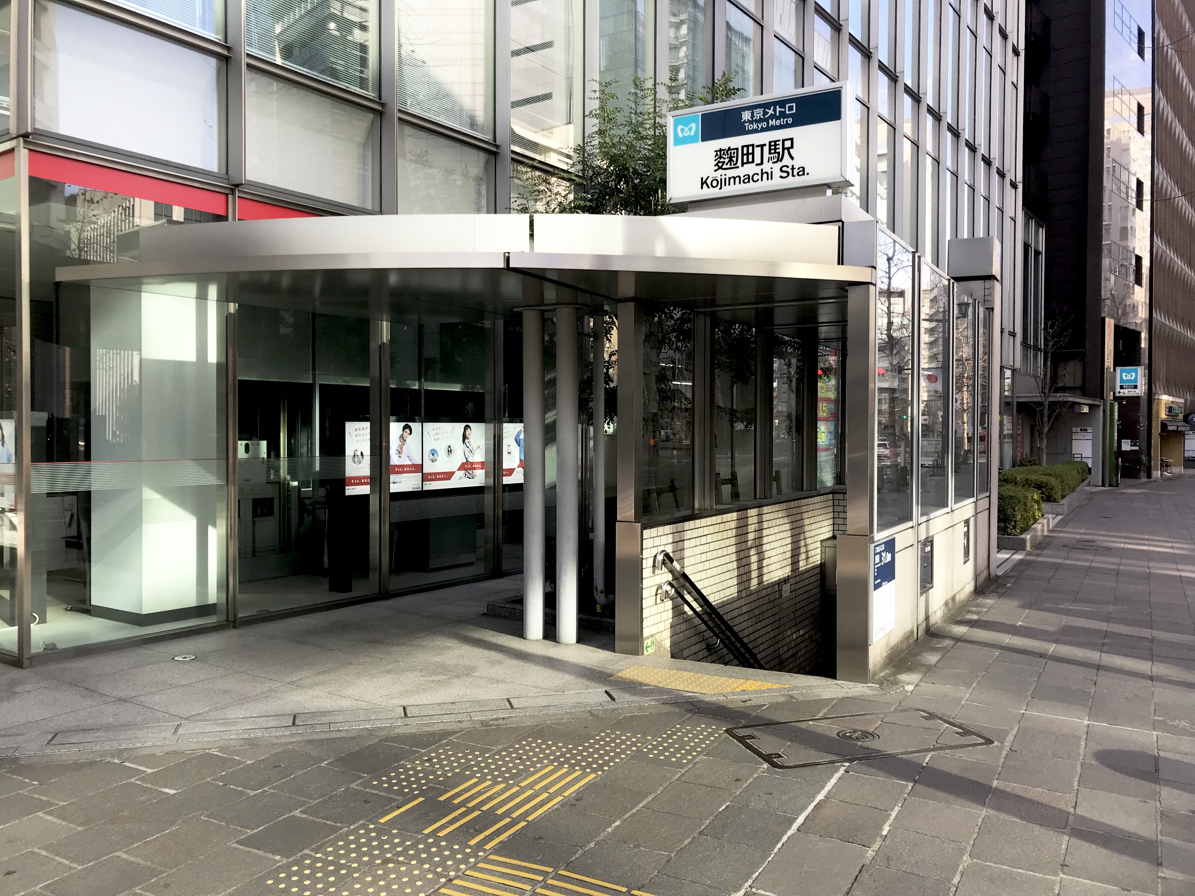 東京メトロ有楽町線麹町駅1番出入口